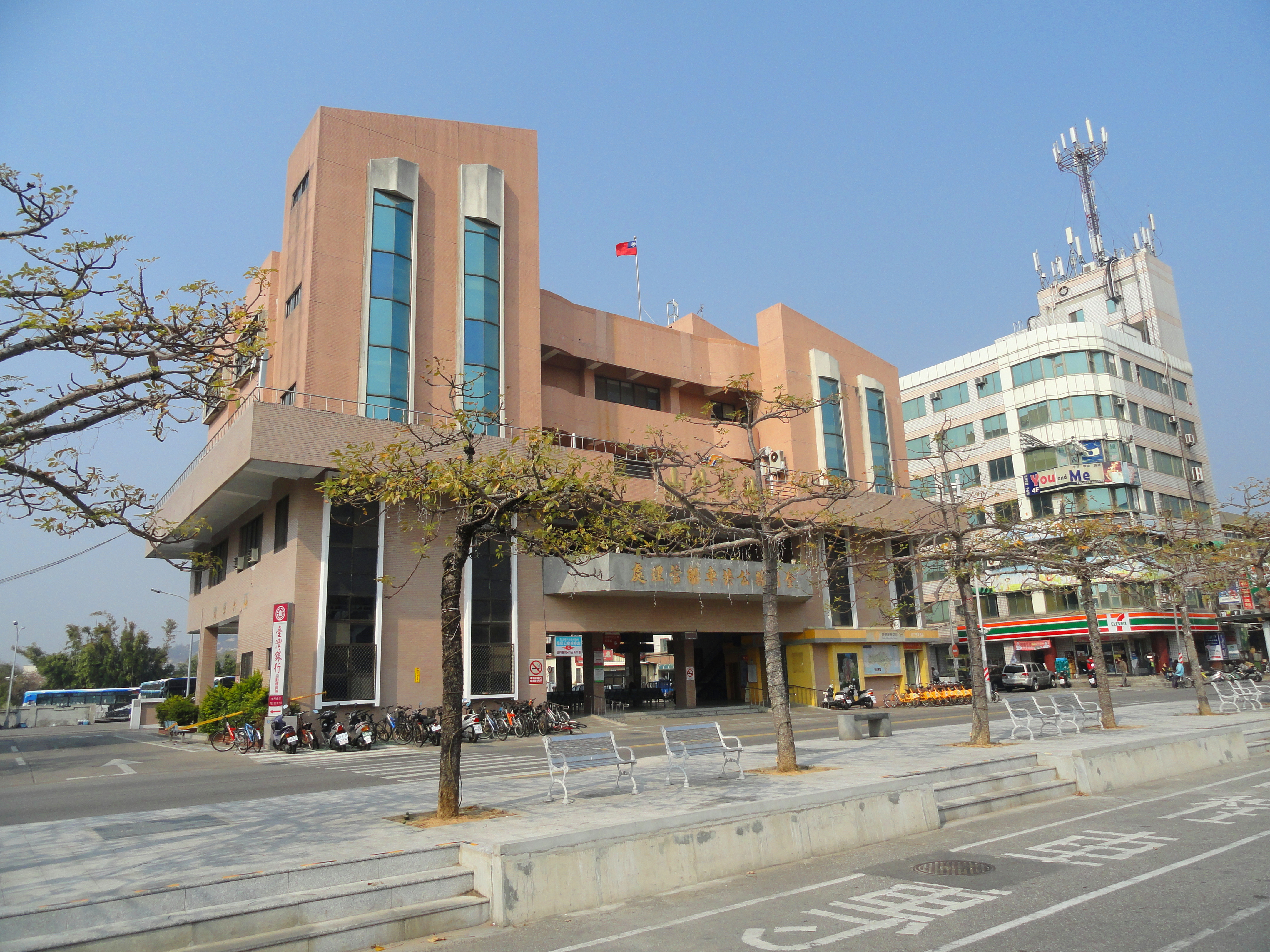 中文（台灣）: 金門縣公共車船管理處山外車站外景。中文（中国大陆）: 金门县公共车船管理处山外车站外景。